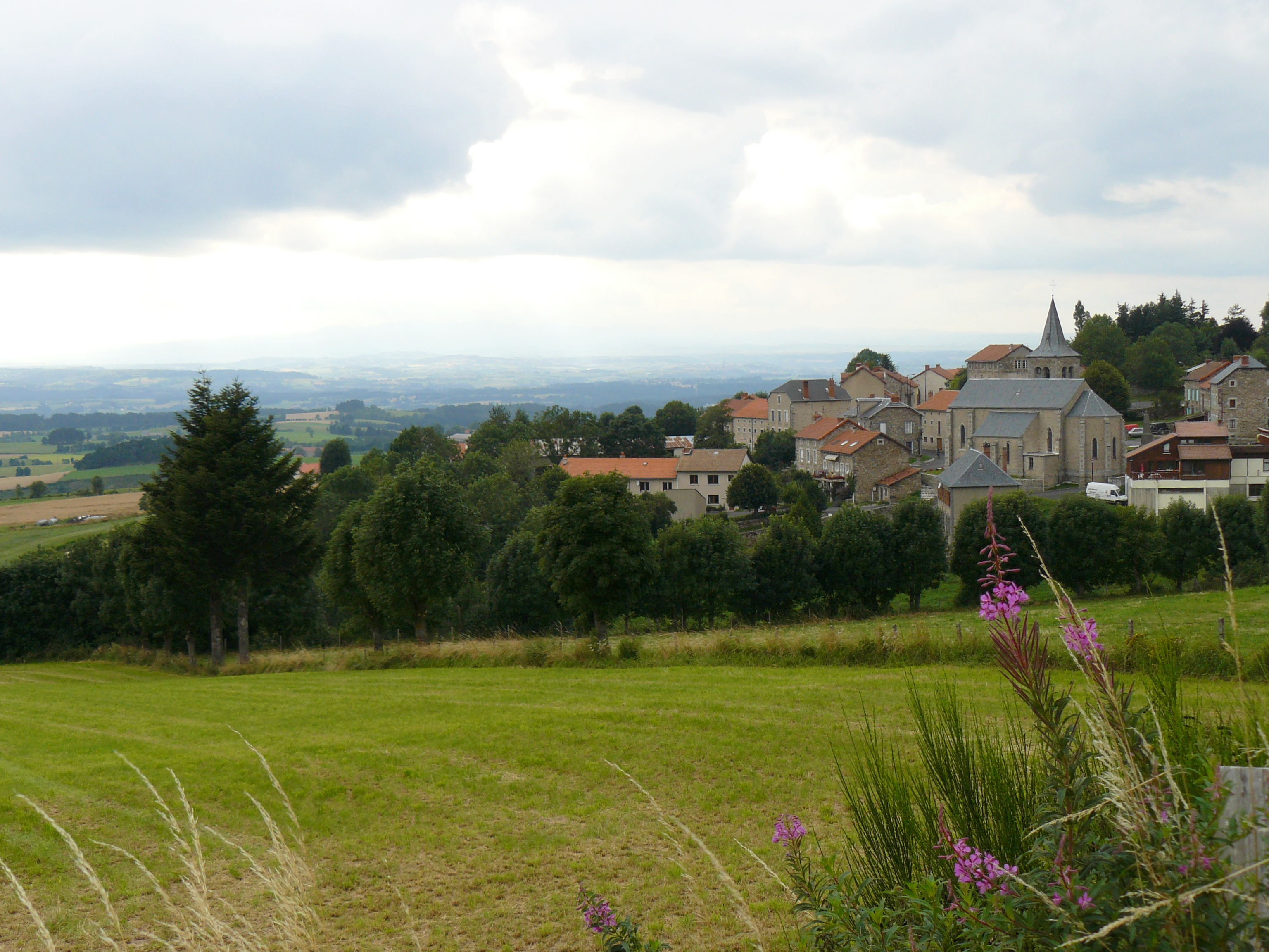 Clavières (Cantal, France)